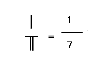 Rod calculus fraction